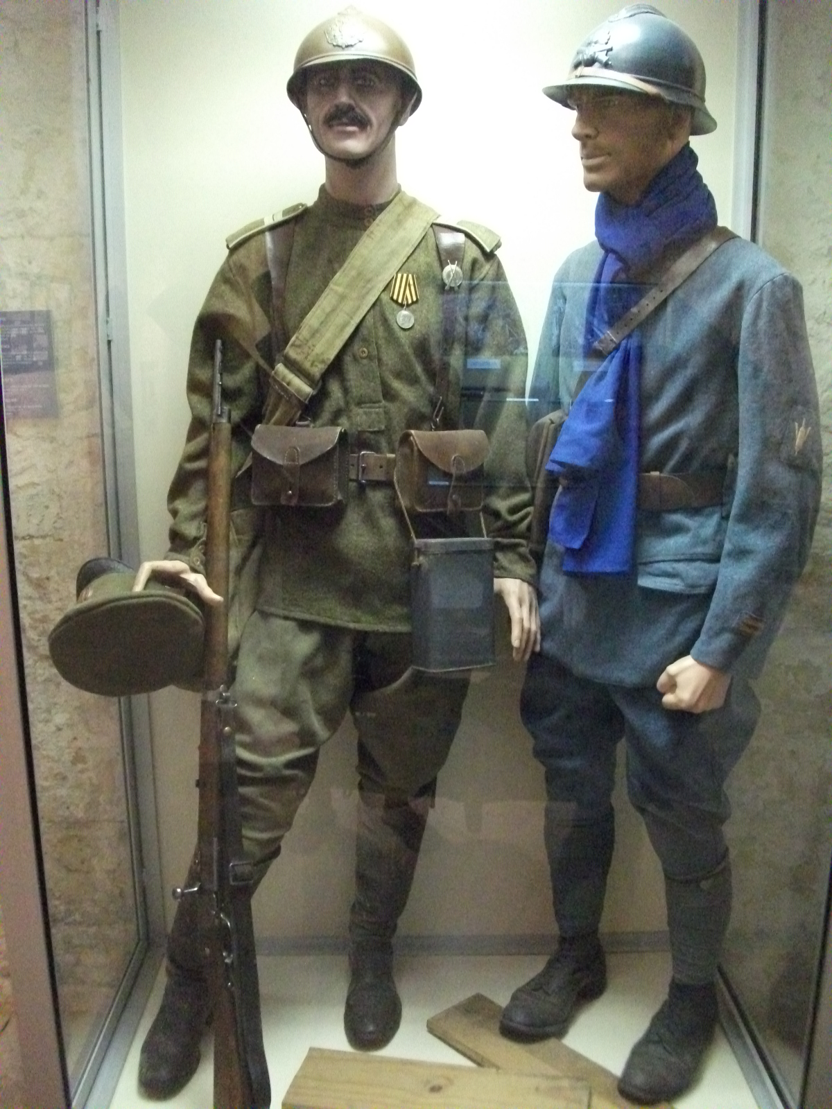 Uniforme de sergent d'infanterie russe badge de tir et médaille de St Georges, lieutenant français d'artillerie de tranchée, présenté au fort de la Pompelle.